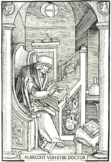 Der gelehrte Bamberger Domherr Albrecht von Eyb auf einem Holzschnitt aus dem Jahr 1521.